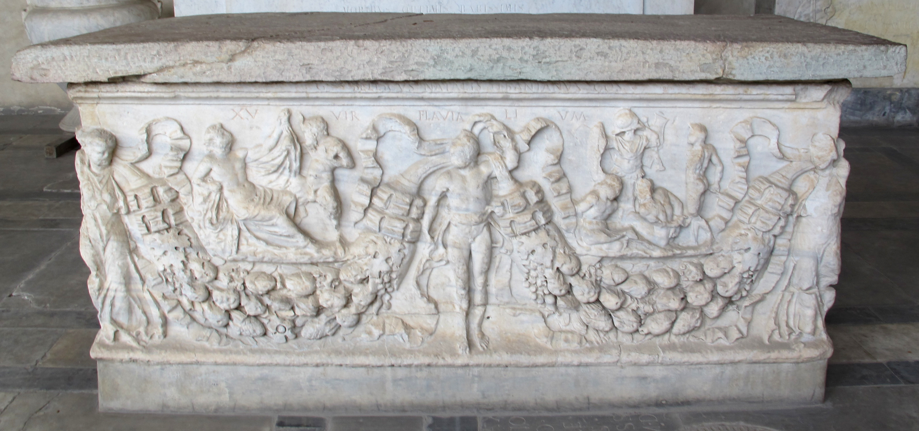 Sarcofago 05 di Caius Bellicus Natalis Tebanianus (110 dc ca.)